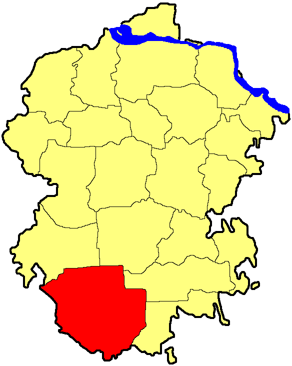 Алатирський район Чувашії